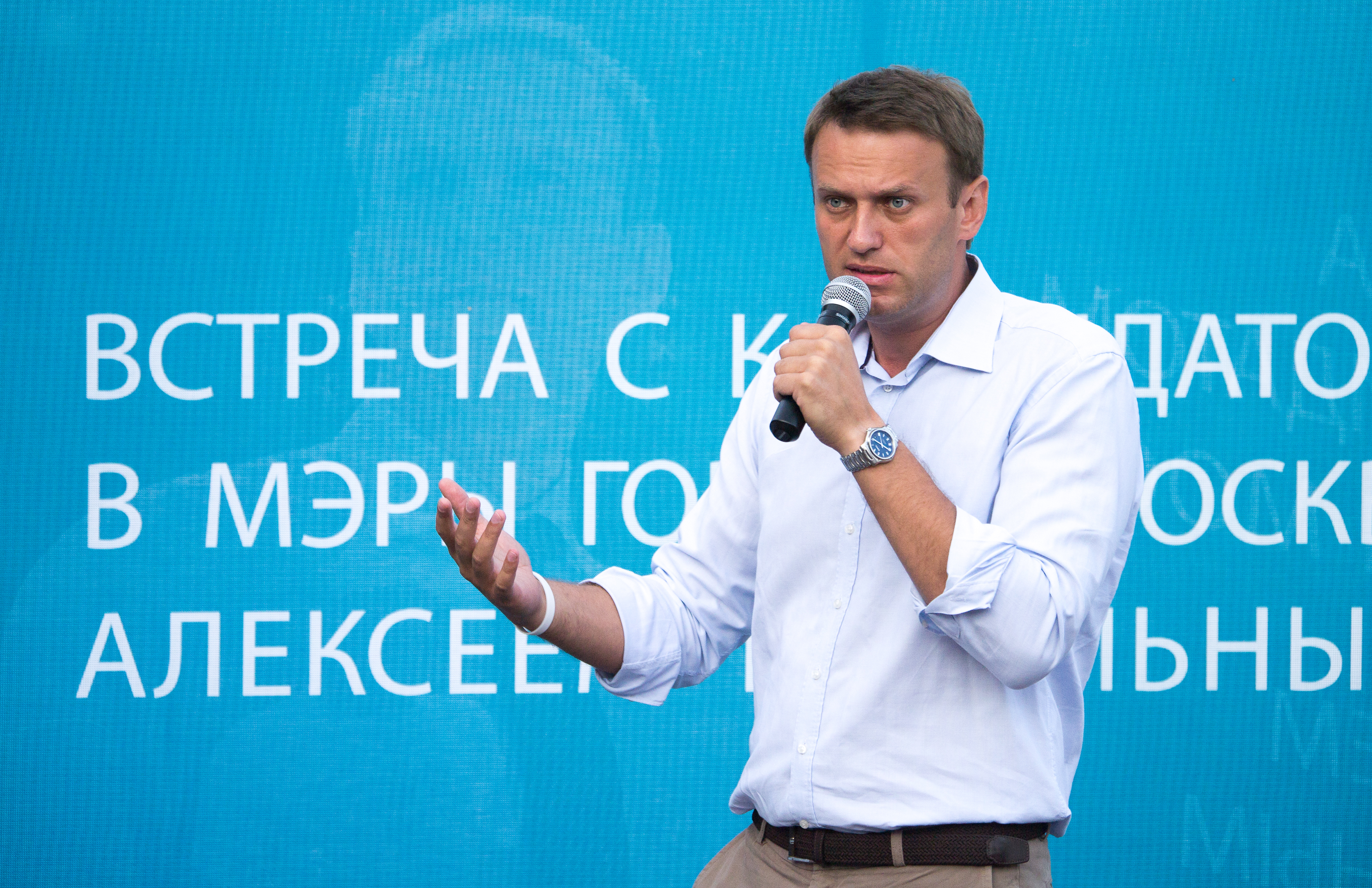 Встреча с избирателями на выборах мэра Москвы 2013 года